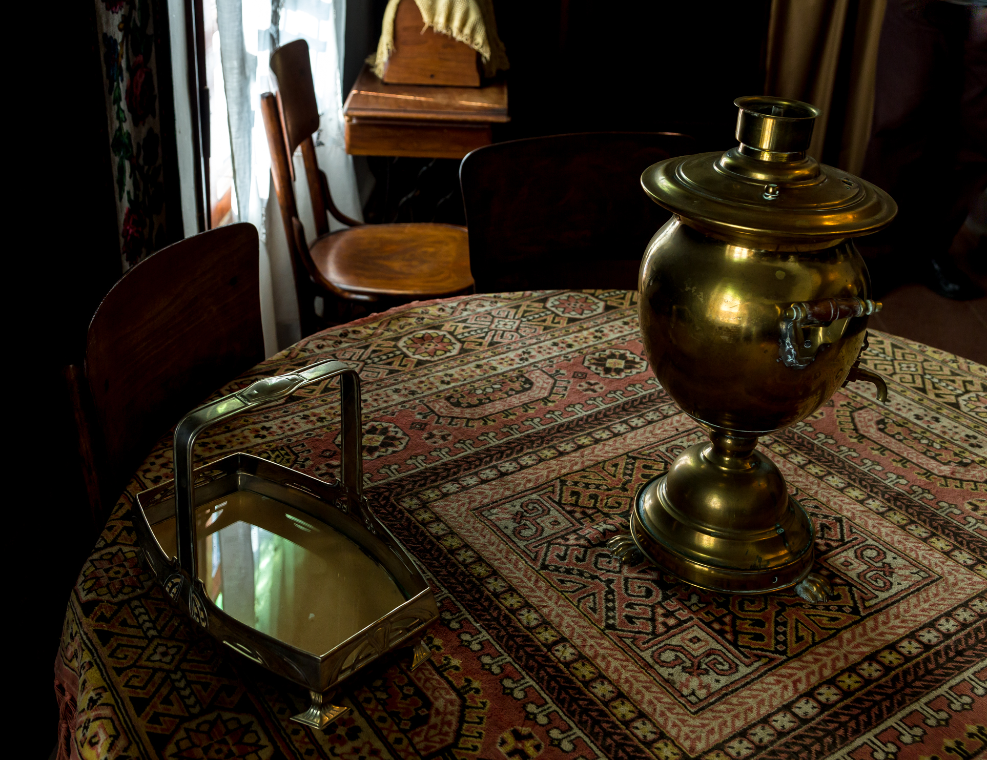 מוזיאון החאן לתולדות חדרה